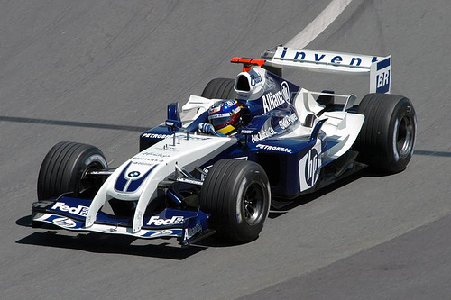 Montoya 2004 Canadian GP